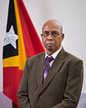 Silvino Adolfo Morais, Abgeordneter des Nationalparlaments Osttimors